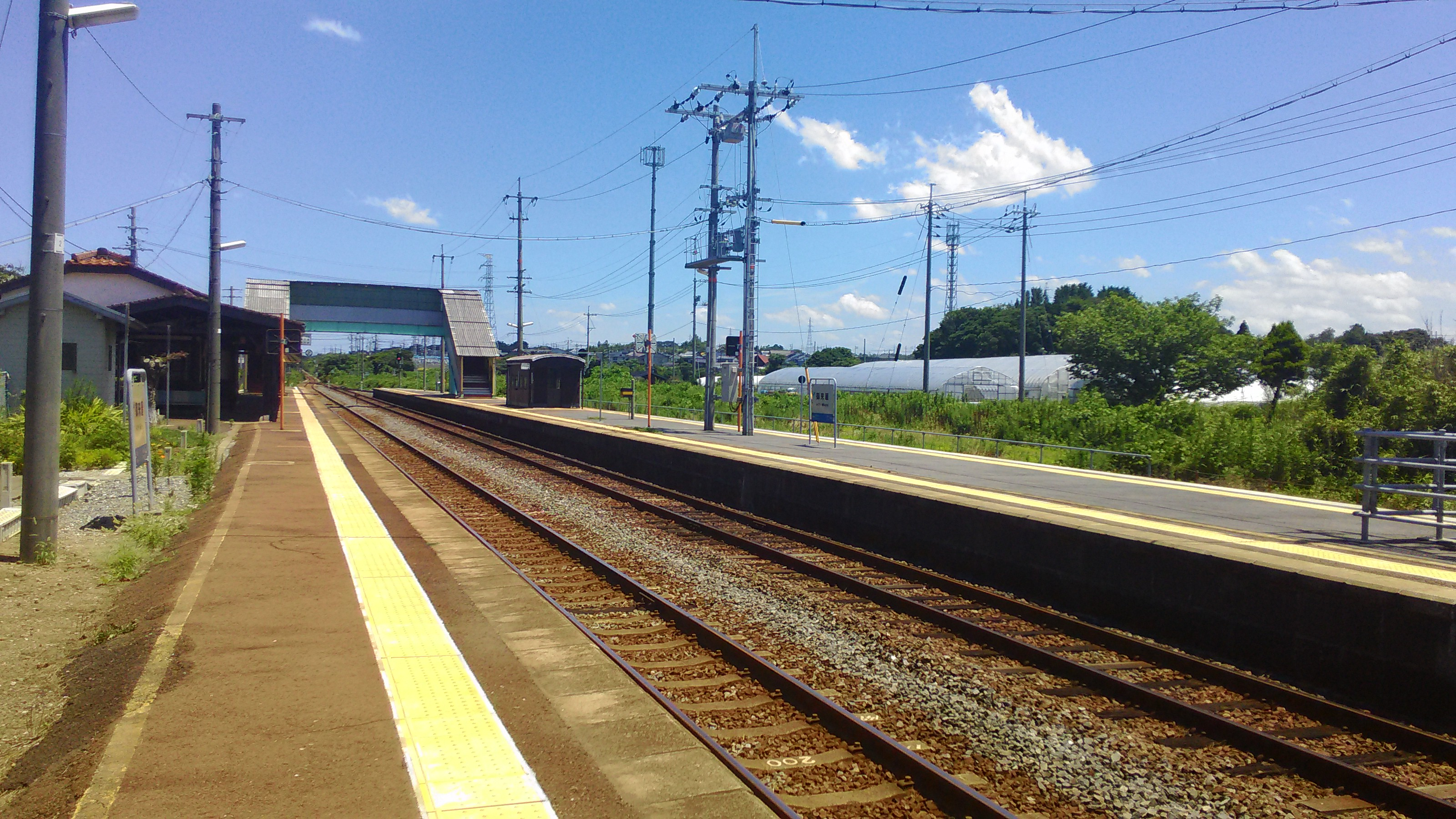 JR西日本山陰本線御来屋駅鳥取方面